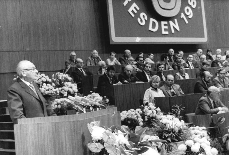 ADN-ZB Reiche-14.10.82-pe-Dresden: 15. Parteitag der CDU - In seiner Ansprache überbrachte am zweiten Beratungstag Pau Verner (l.), Mitglied des Politbüros und Sekretär des ZK der SED, herzliche Grüße des ZK der SED und seines Generalsekretärs, Erich Honecker, an den CDU-Parteitag.